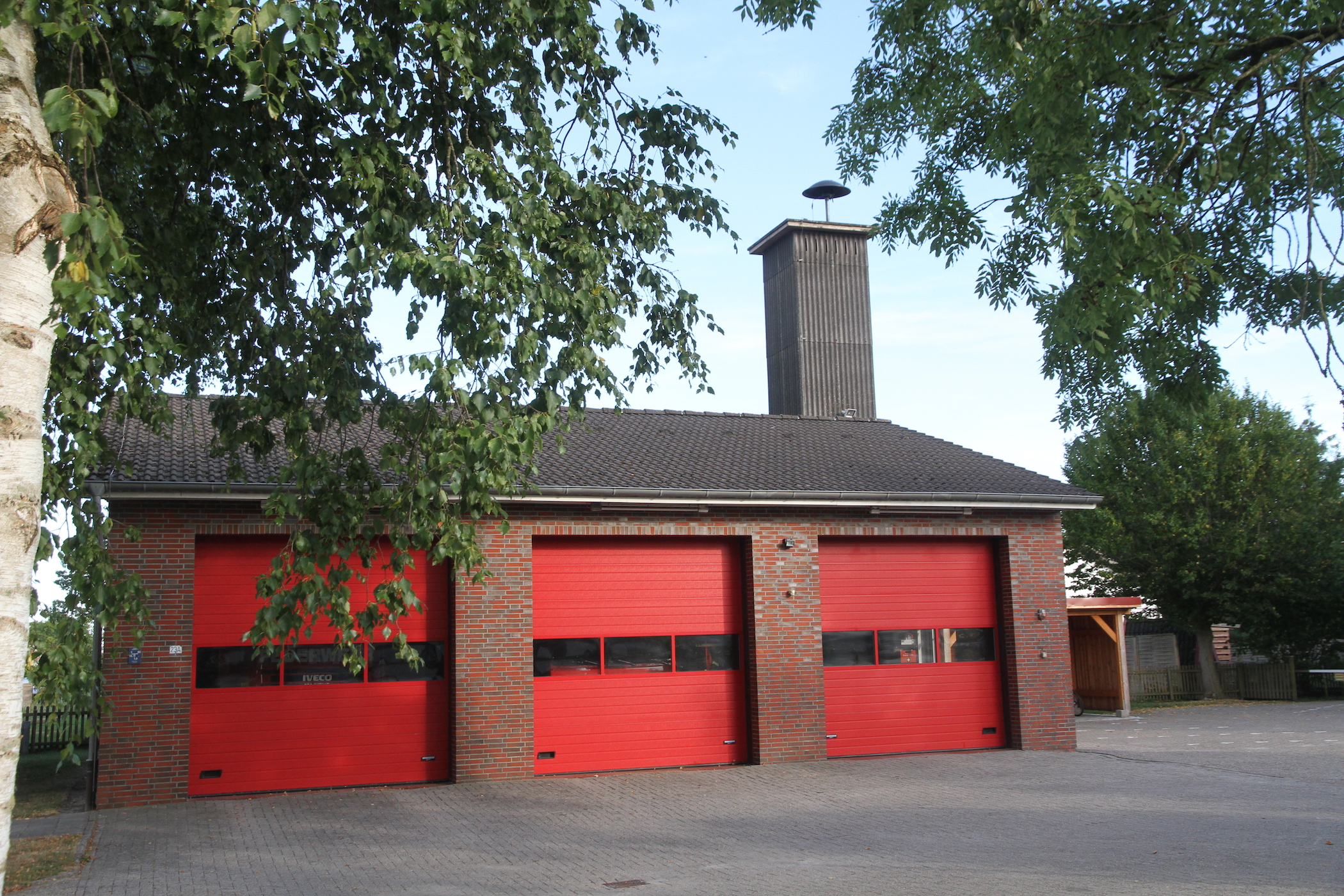 Gebäude Freiwillige Feuerwehr Schweiburg in der Gemeinde Jade